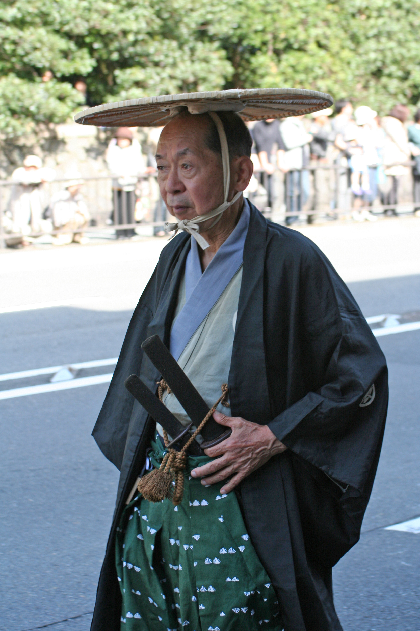 京都府京都市にて開催された時代祭。正午の御所から平安神宮までの行進の様子。2009年10月22日撮影。